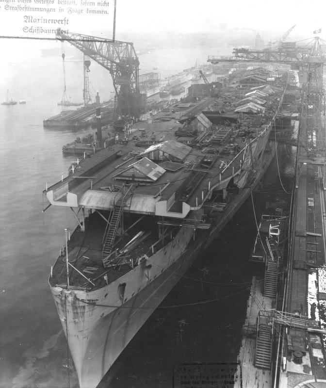 Flugzeugträger "A". Baustadium Aufgen. am 22.3.1939 Deutsche Werke Kiel